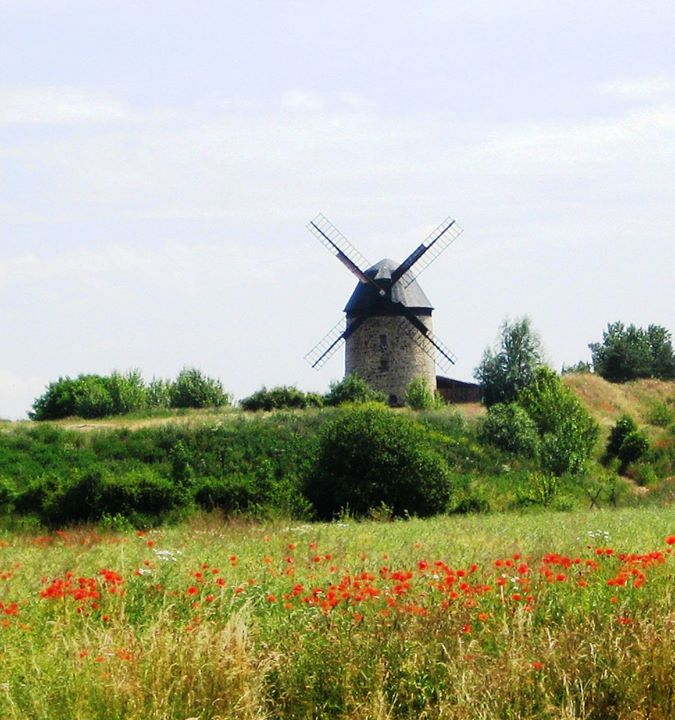 Die Warnstedter Mühle 2010